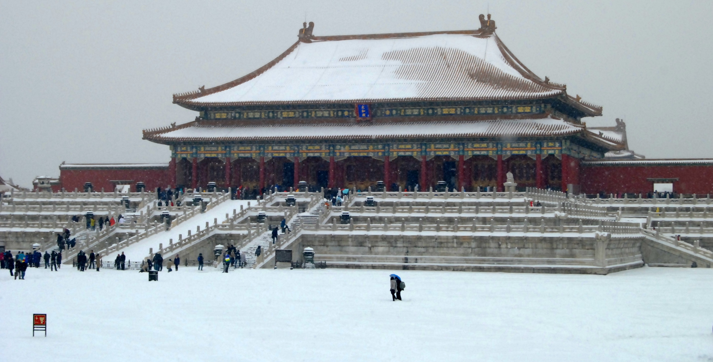 中文（中国大陆）: 雪中紫禁城